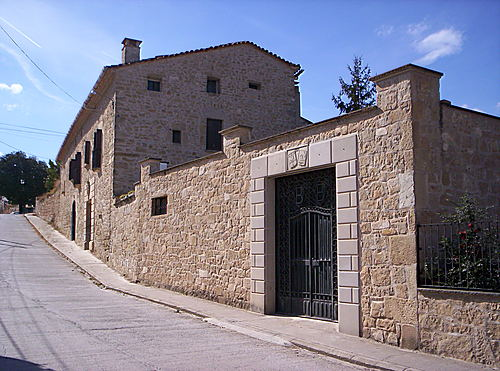 Casa Llorach, en Omellóns (Lérida, España)